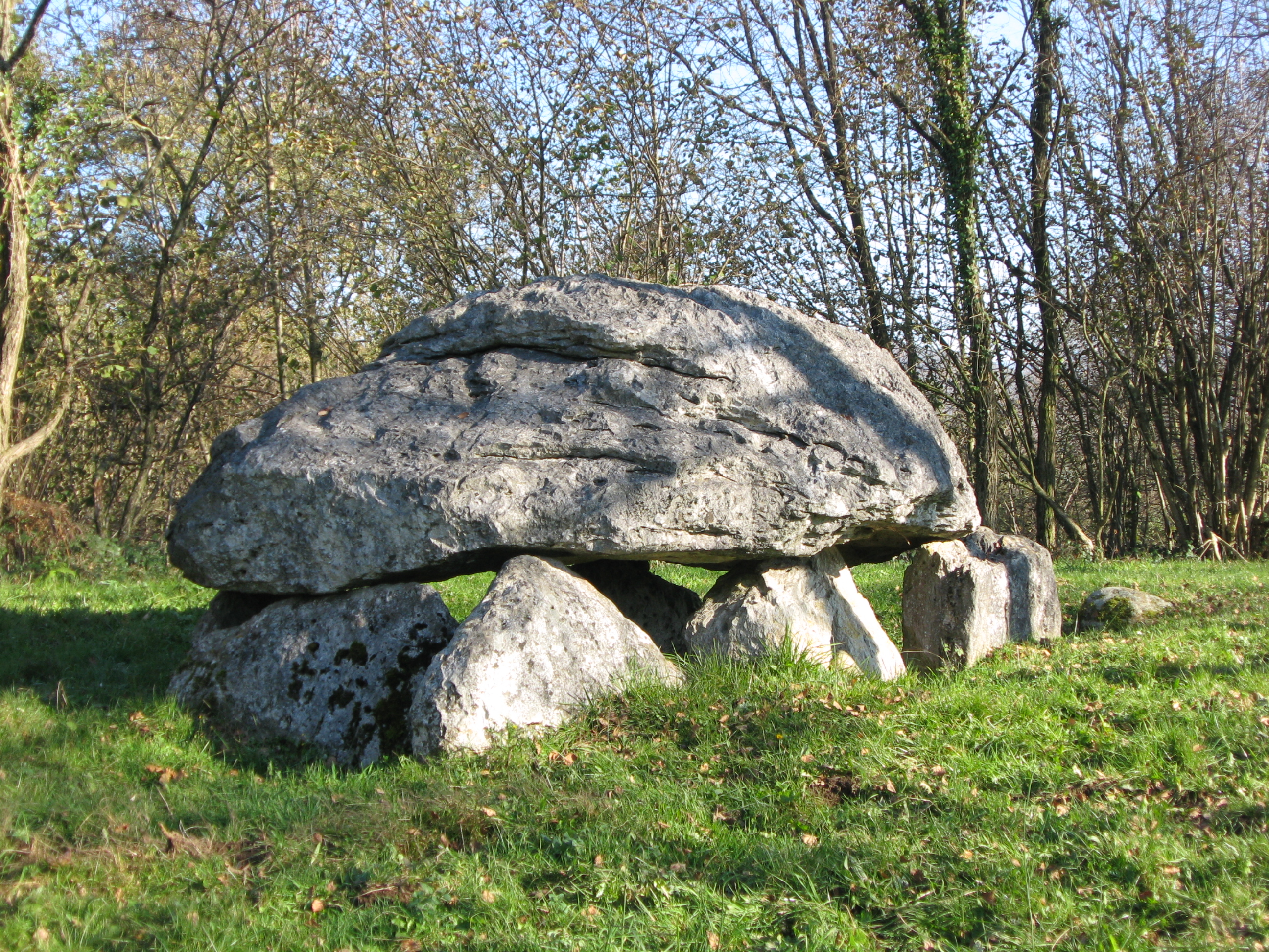 Vue du dolmen de Buzy (Pyrénées-Atlantiques) (Pyrénées).